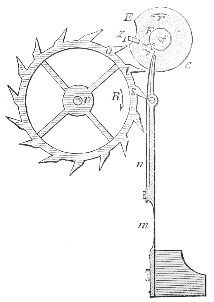 "Tidens naturlære" 1903 af Poul la Cour, Fig. 28. Kronometergang. Bogen findes digitalt på Tidens Naturlære "Tidens naturlære" (Nature of time) 1903 by Poul la Cour, Ill. 28. The book is digitized at Tidens Naturlære